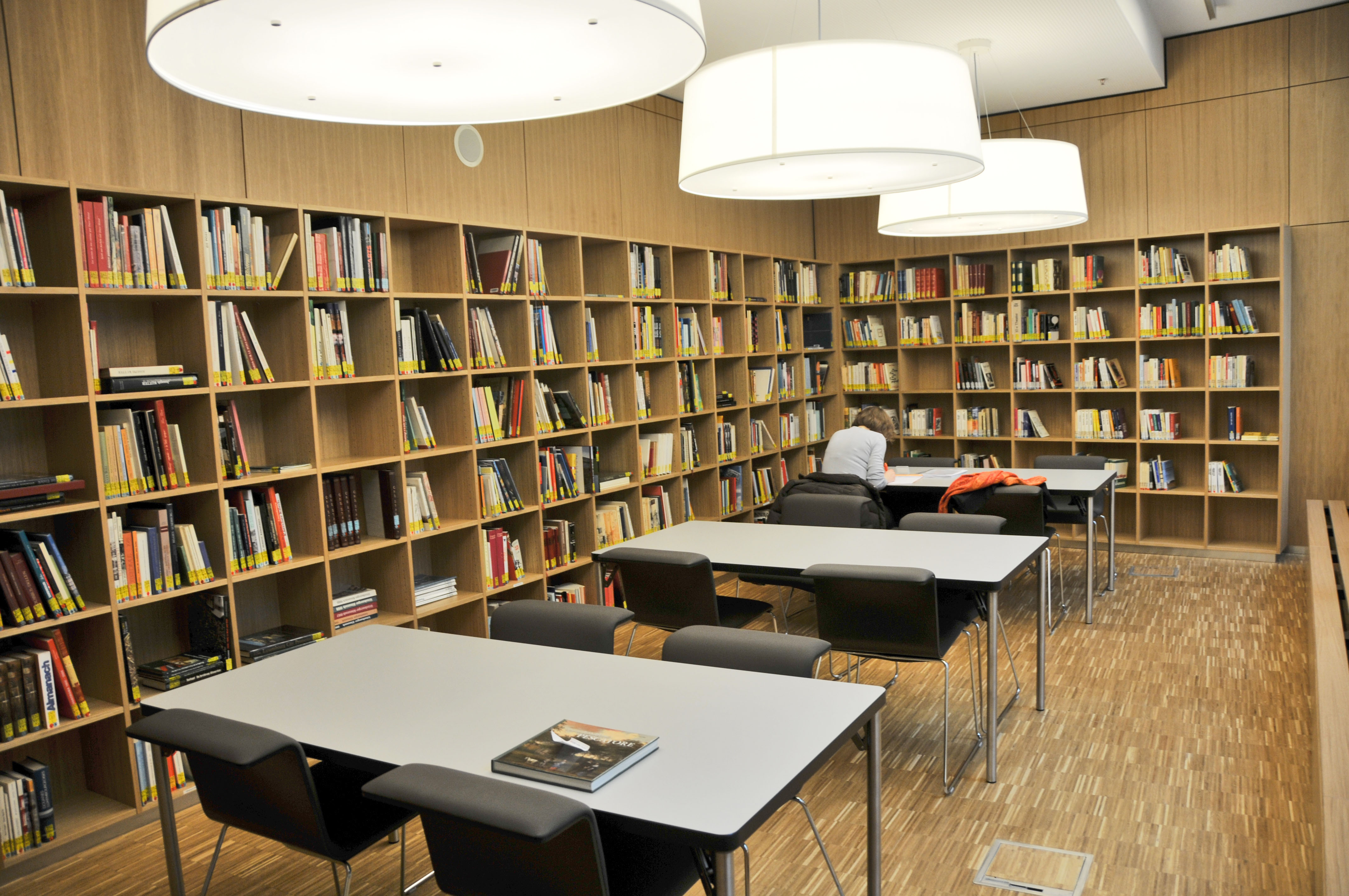 Sujet: De Sall mat der Luxemburgensia vun der stater Bibliothéik Auteur: lb : User: Cayambe Source: Eege Foto. Erlabnes vun der Directrice. Lizenz: Creative Commons